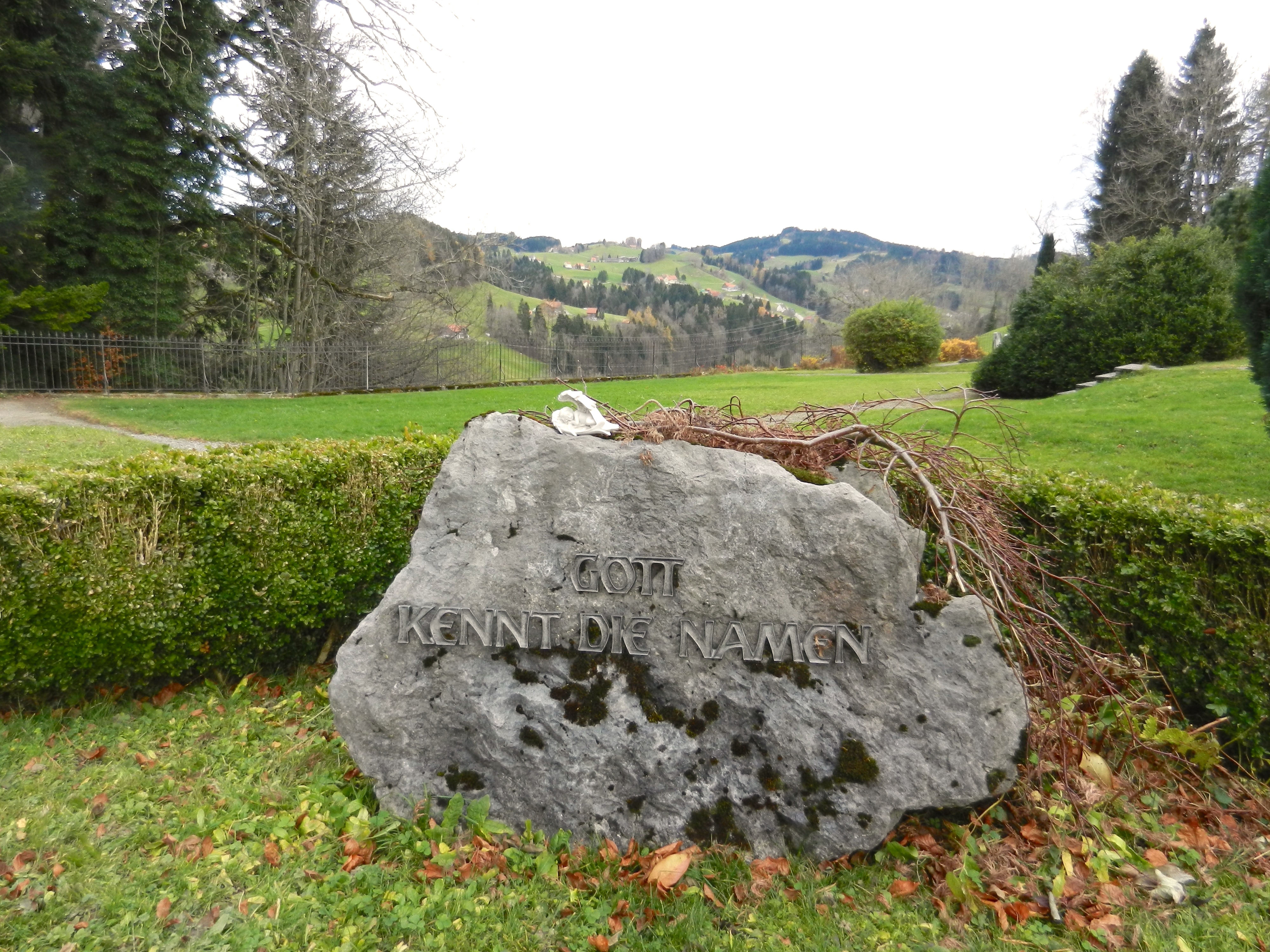 Gemeinschaftsgrab (ohne Namensnennung) des Friedhofs Trogen; es liegt zentral in der Nähe des Aufbahrungsraums und ist mit Buchs eingefasst. Hier wurde 2003 auch Elisabeth Pletschers Asche beigesetzt